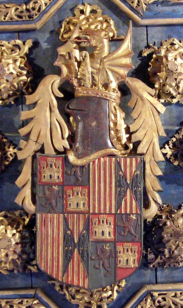 Armas de Fernando II de Aragón, el Católico, en el Palacio de los Reyes Católicos de Aljafería. Fines siglo XV (h. 1492)